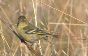 Hembra posada Description: Black chined siskin female resting (Carduelis barbata) Creator: Claudio Silva. Date: 21 de enero de 2008 (21-01-2008) Place: Los Molles (Chile)